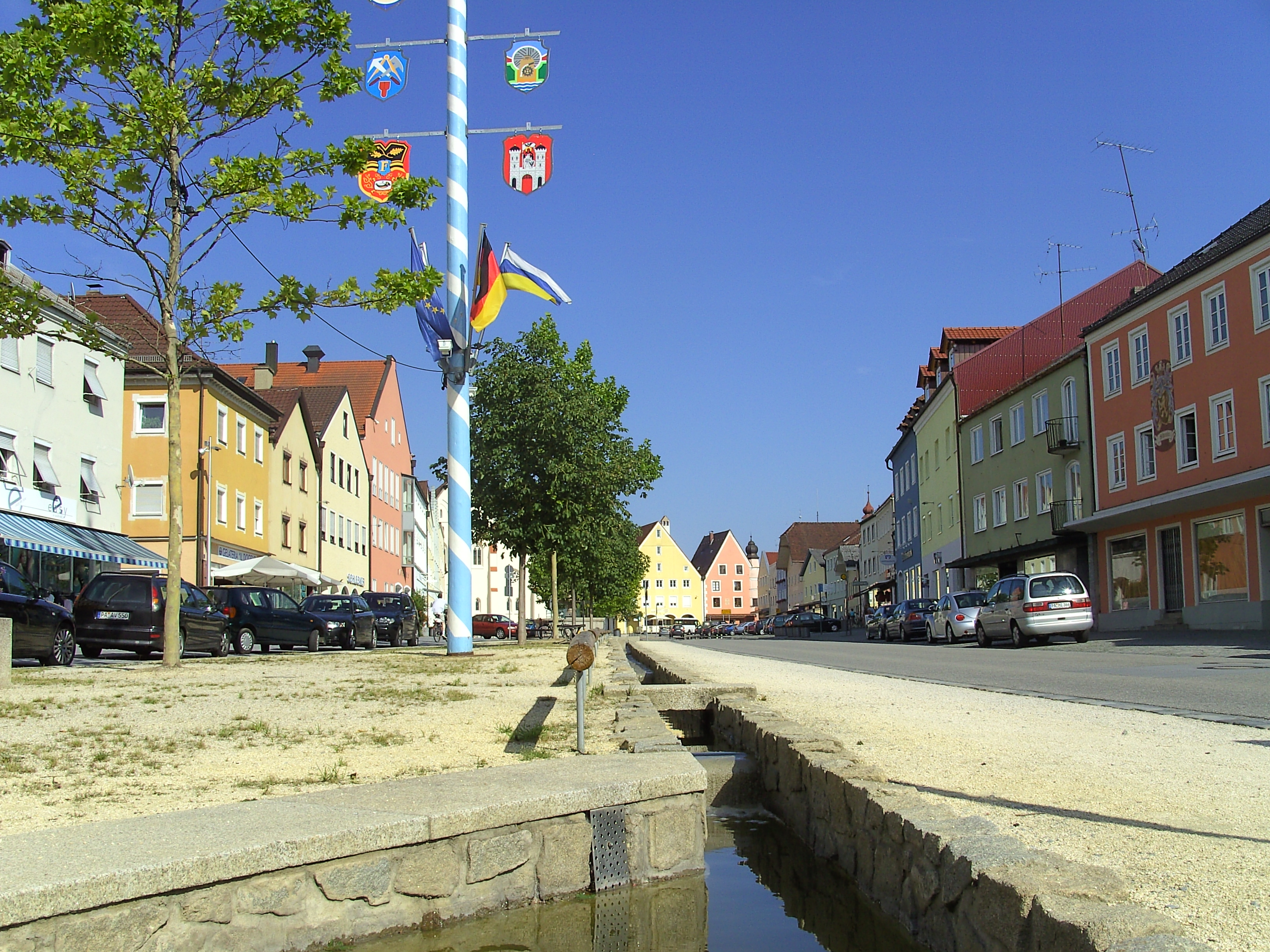 Marktplatz von Aidenbach.